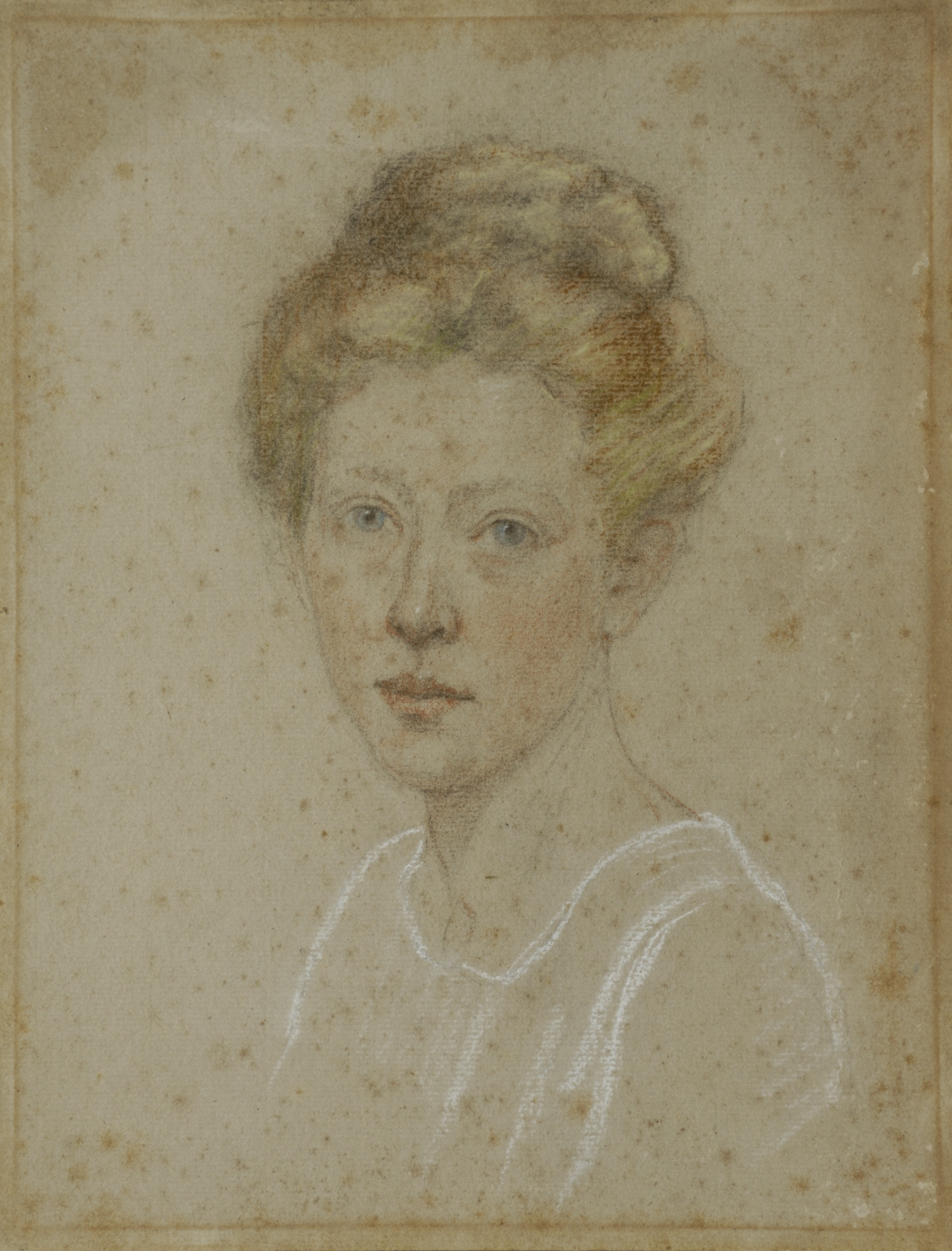 Ilse Jonas, Selbstbildnis